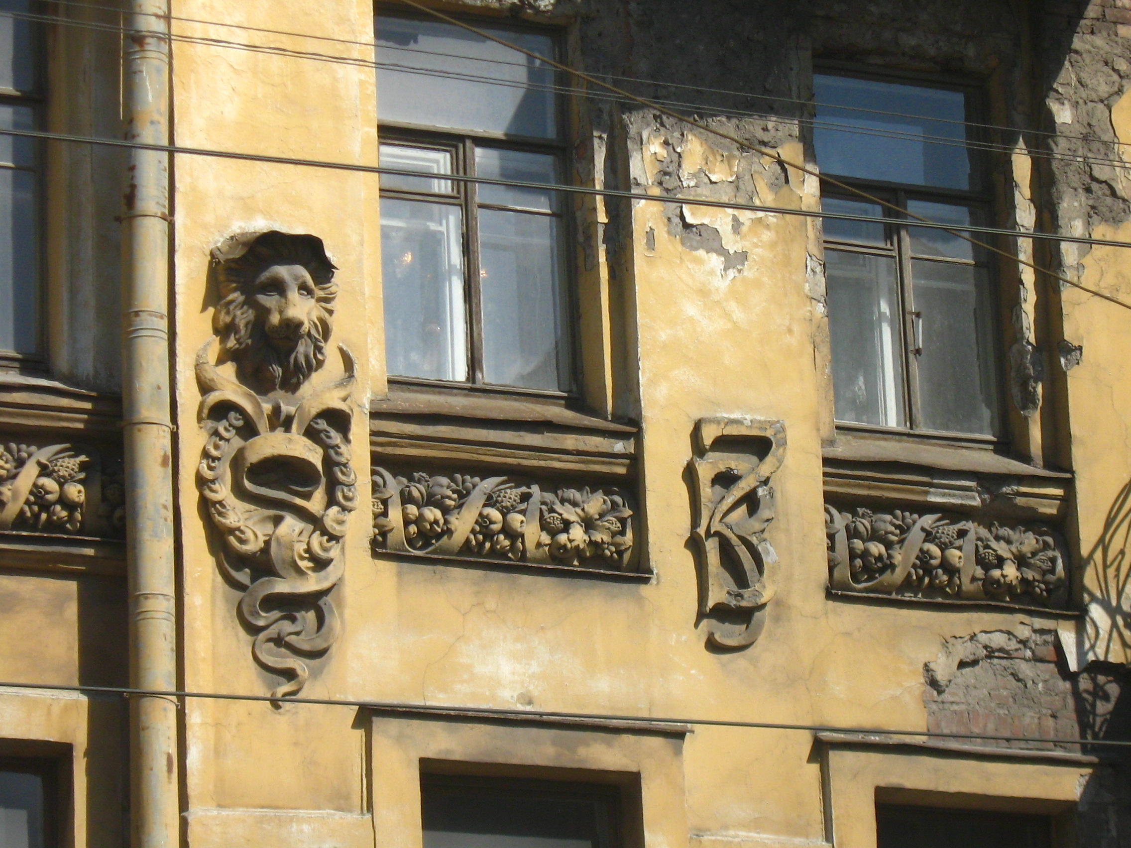 Lesnoy avenue, 3 (Lion's figure) (St.-Petersburg, Russia)